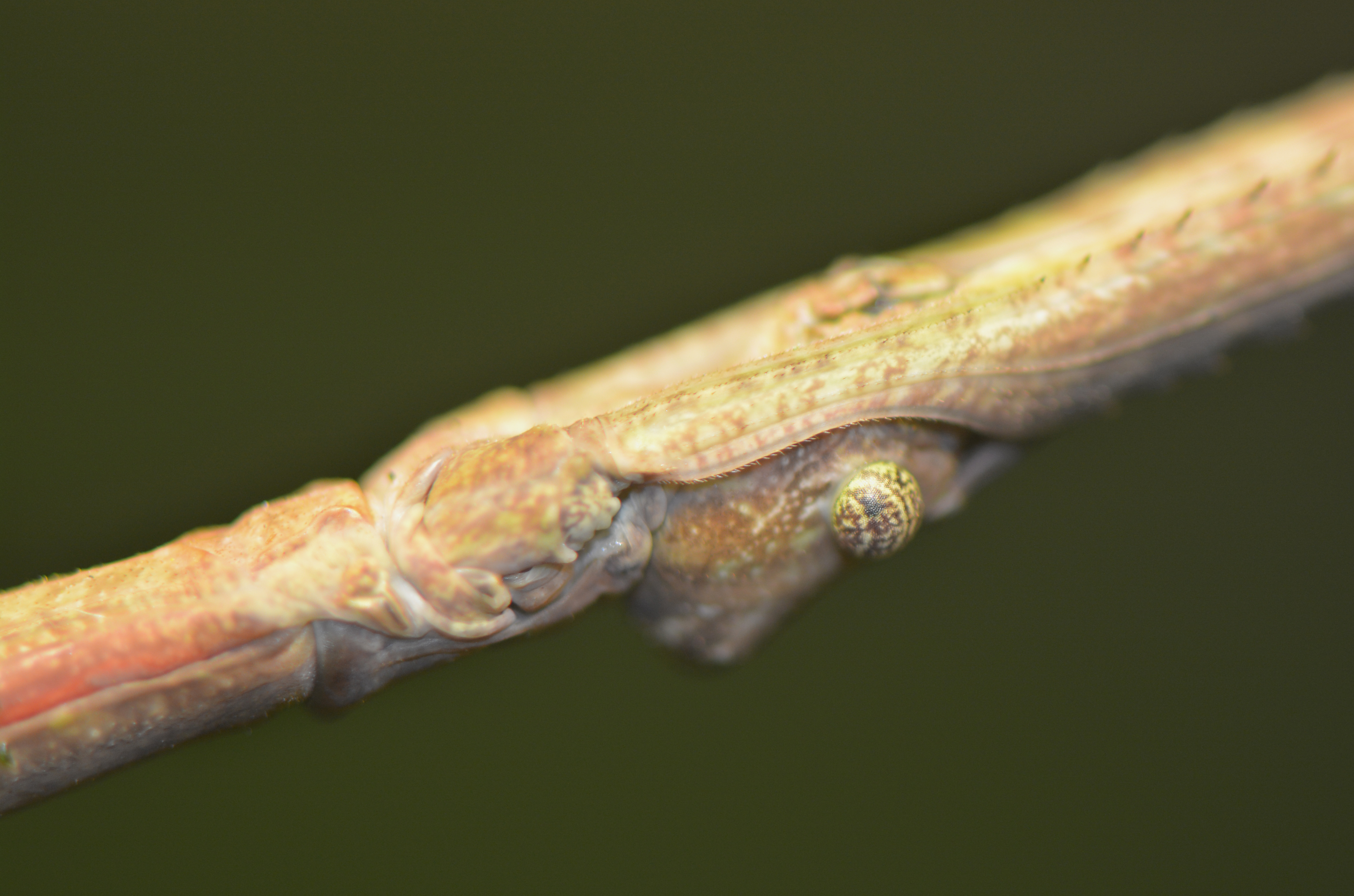 Oeil de phasme (vivant). Musée d'histoire naturelle de Lille